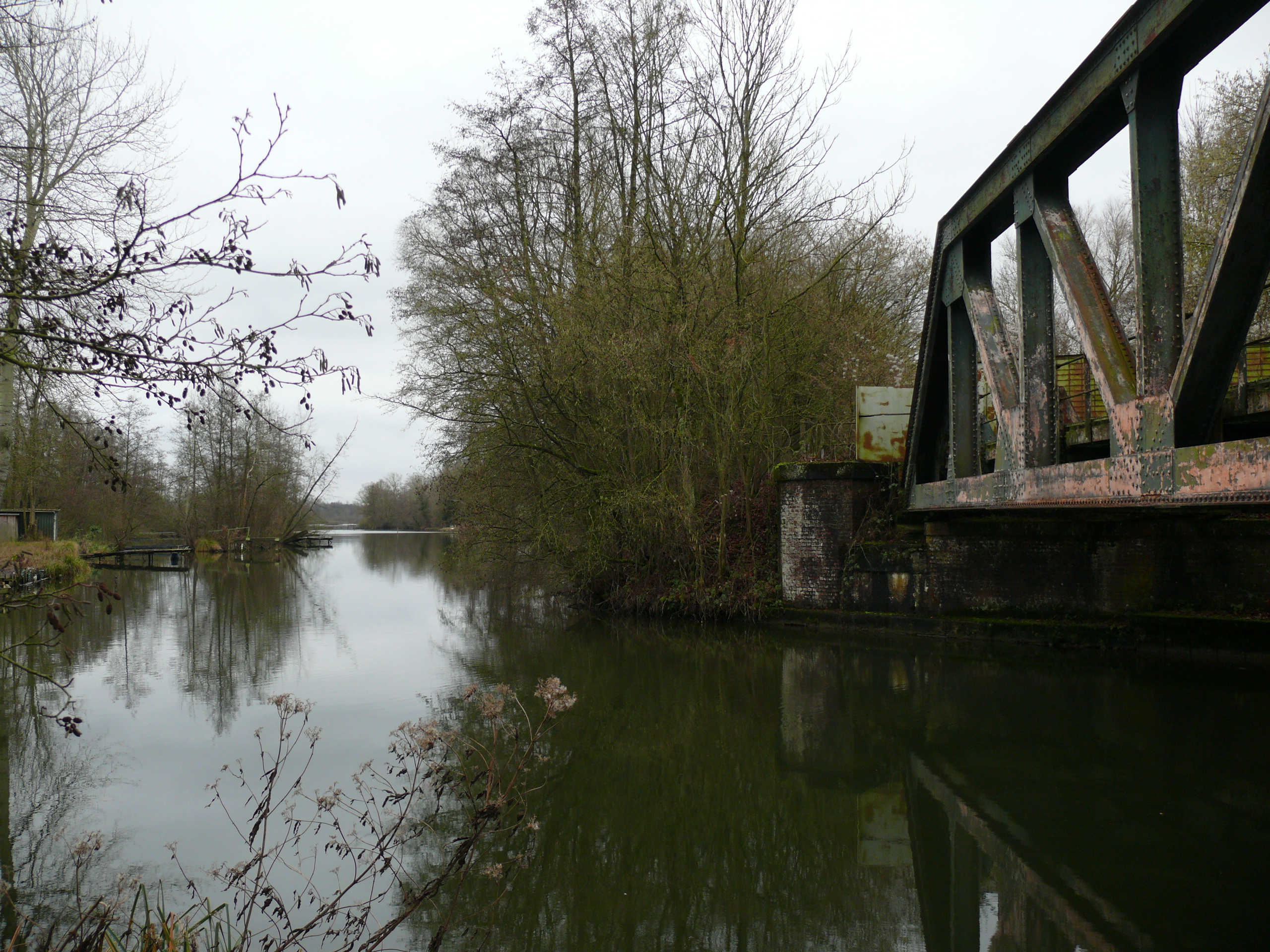 La Somme à Péronne, franchie par le Pont (désaffecté) de la Ligne de Saint-Just-en-Chaussée à Douai